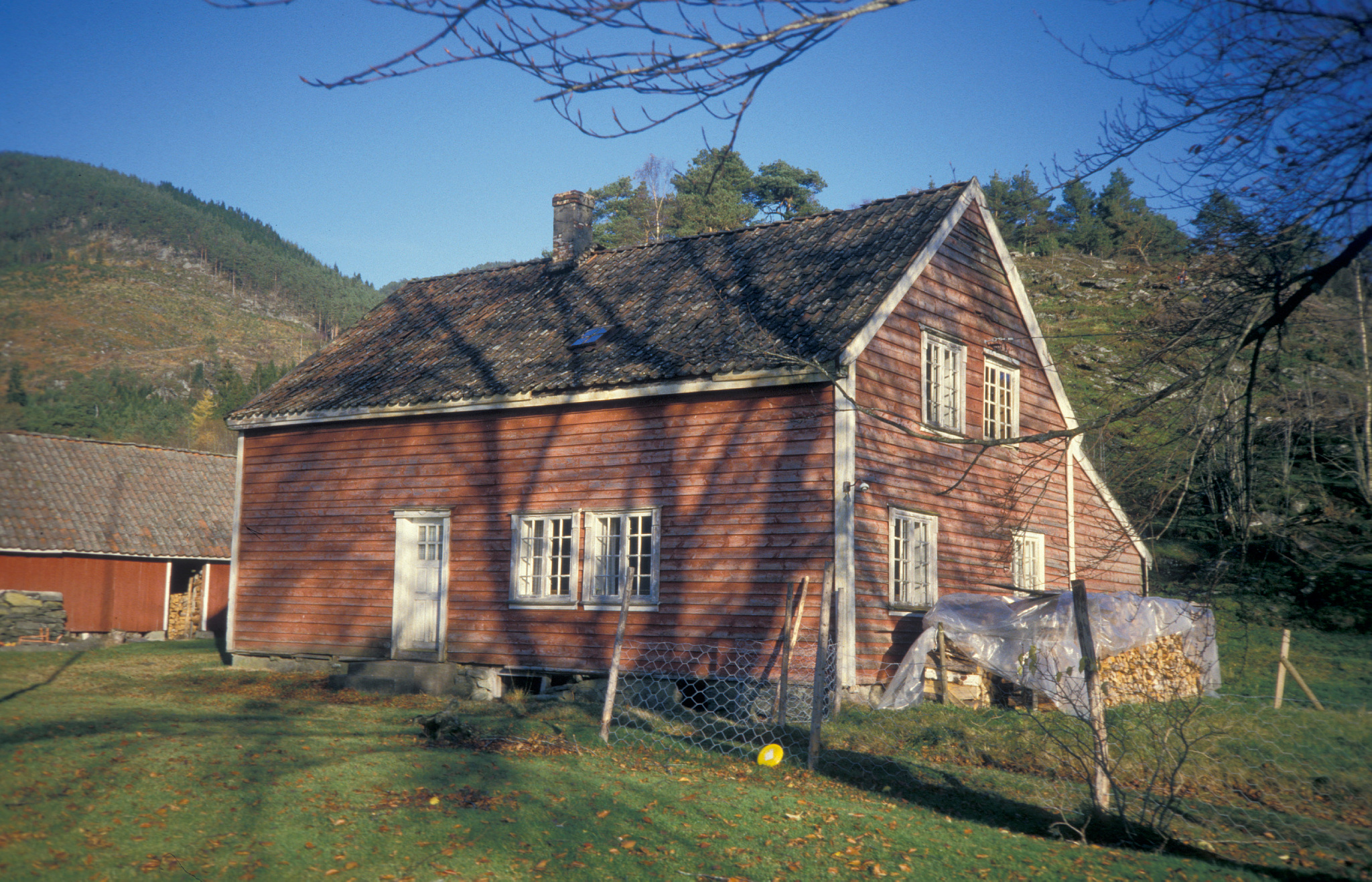 Borgstue ved Jelsa prestegård. Foto: Kay M. Staaland, fra Riksantikvarens Kulturminnebilder.